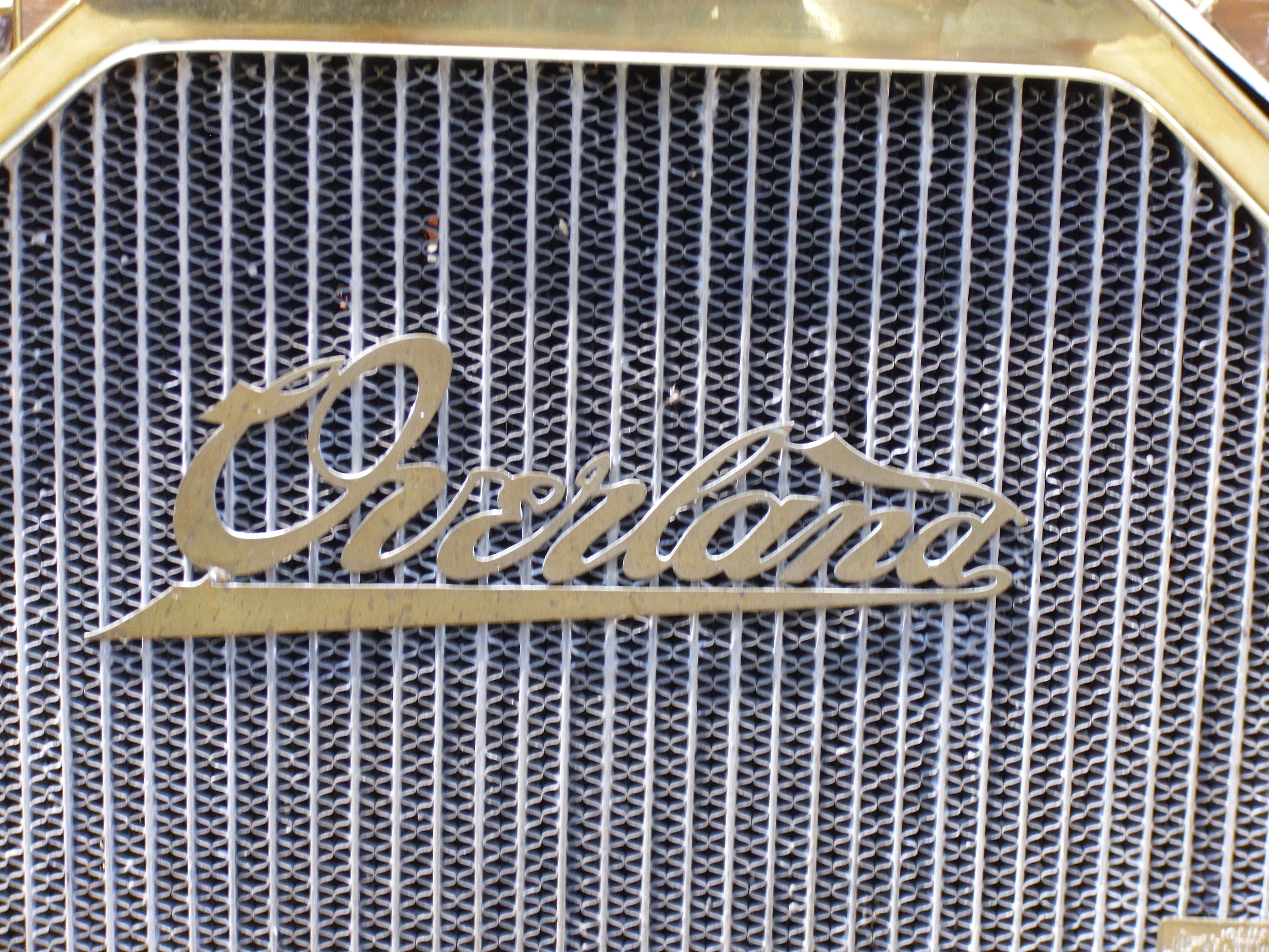 Emblem Overland